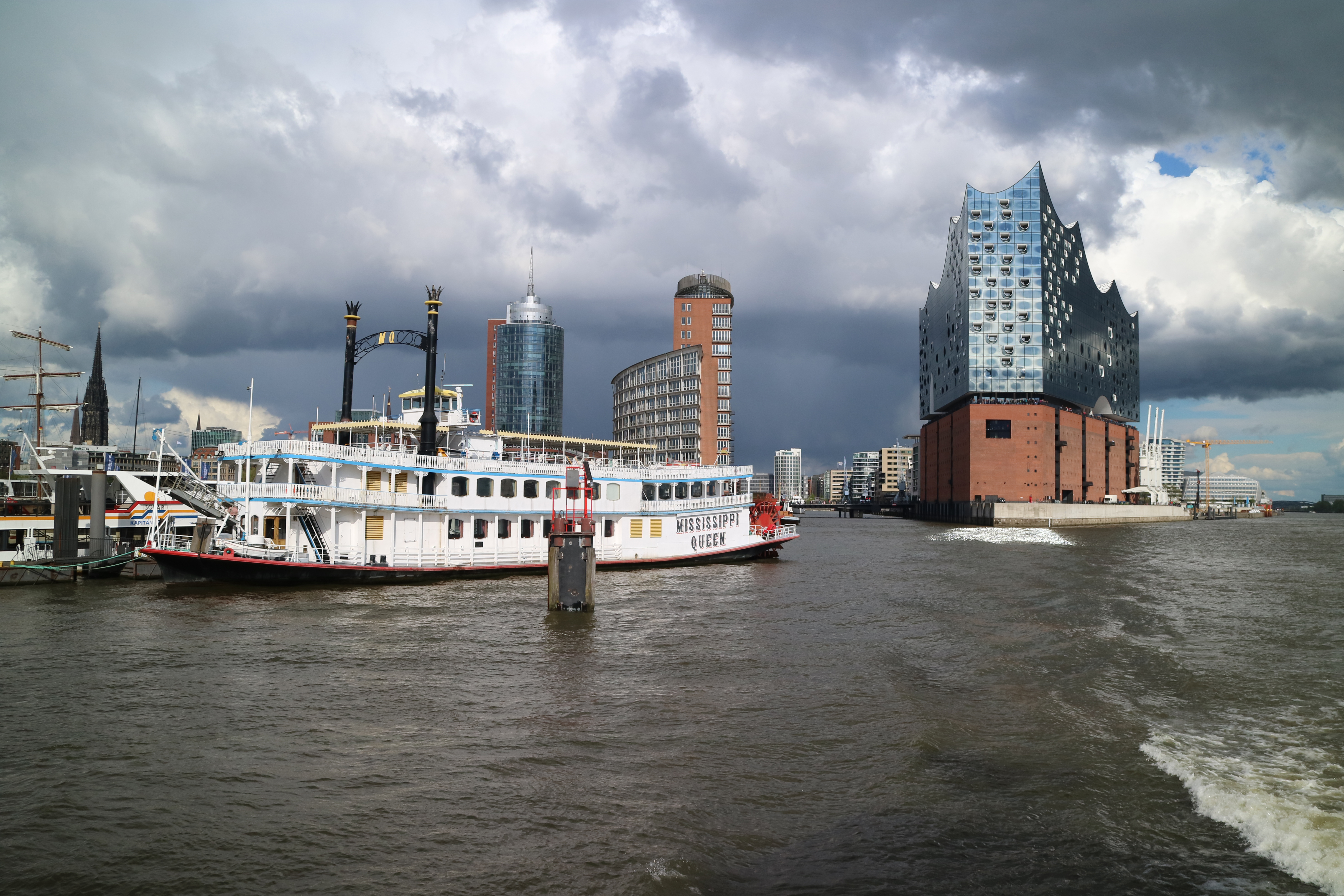 Heckraddampfer Mississippi Queen vor der Elbphilharmonie (rechts) im Hamburger Hafen